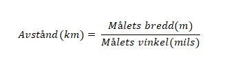 Formel för beräkning av avstånd